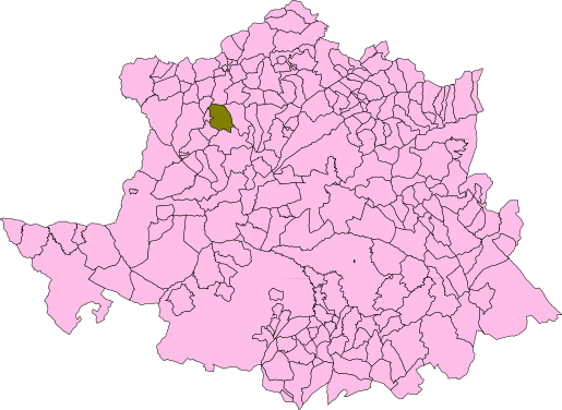 Calzadilla